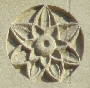 Nymphaea Alba Lotus Ägyptia am alten Rathaus in Luxemburg Stadt am Krautmarkt (Palais Grand-ducal)